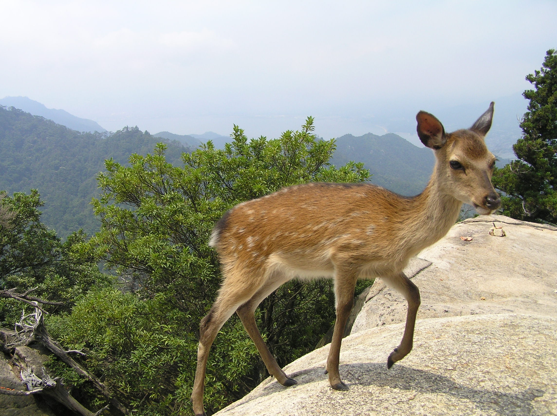 Miyajima, Japan.